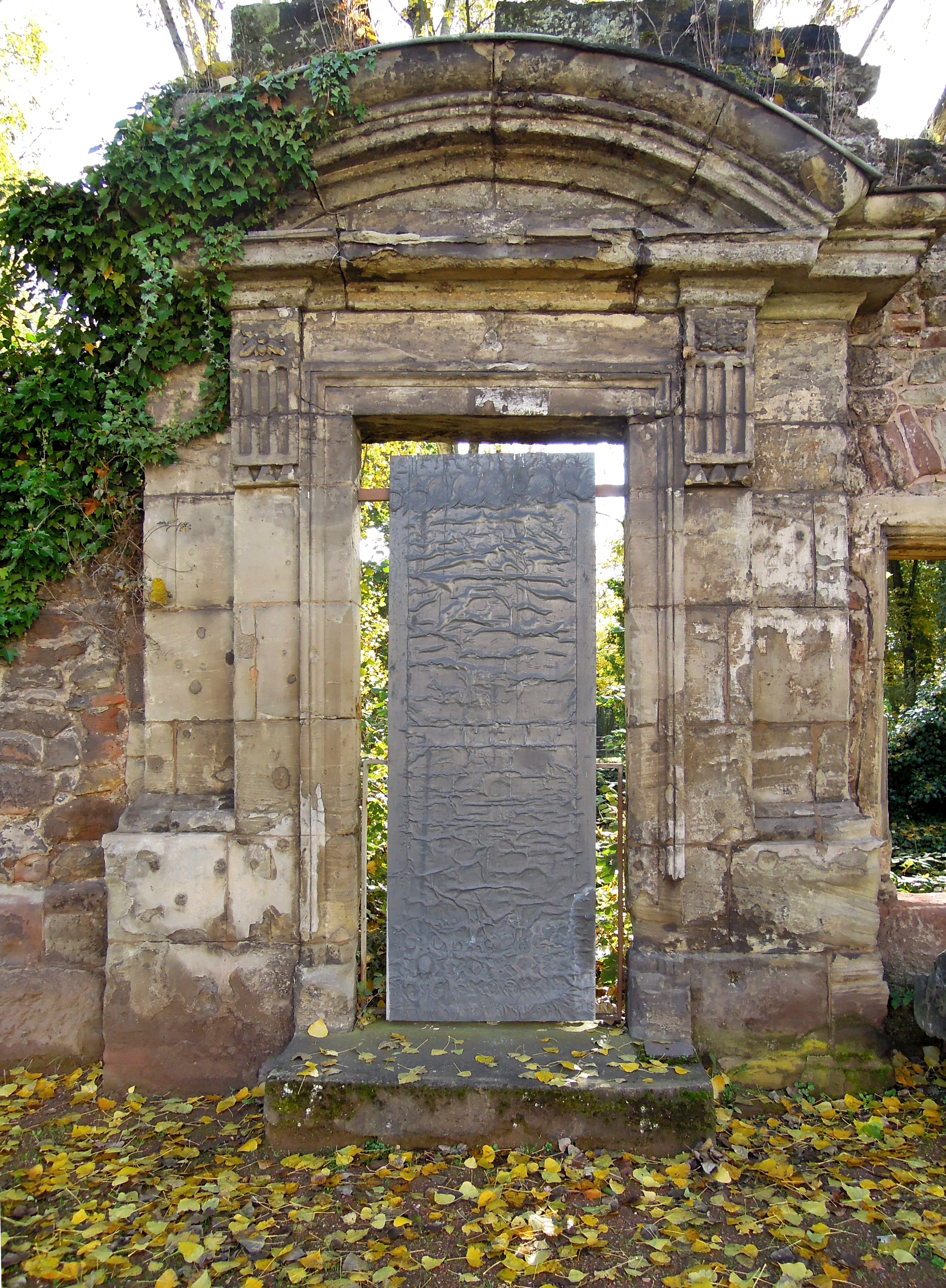 "Vorhang" (Magdalena Grandmontagne)